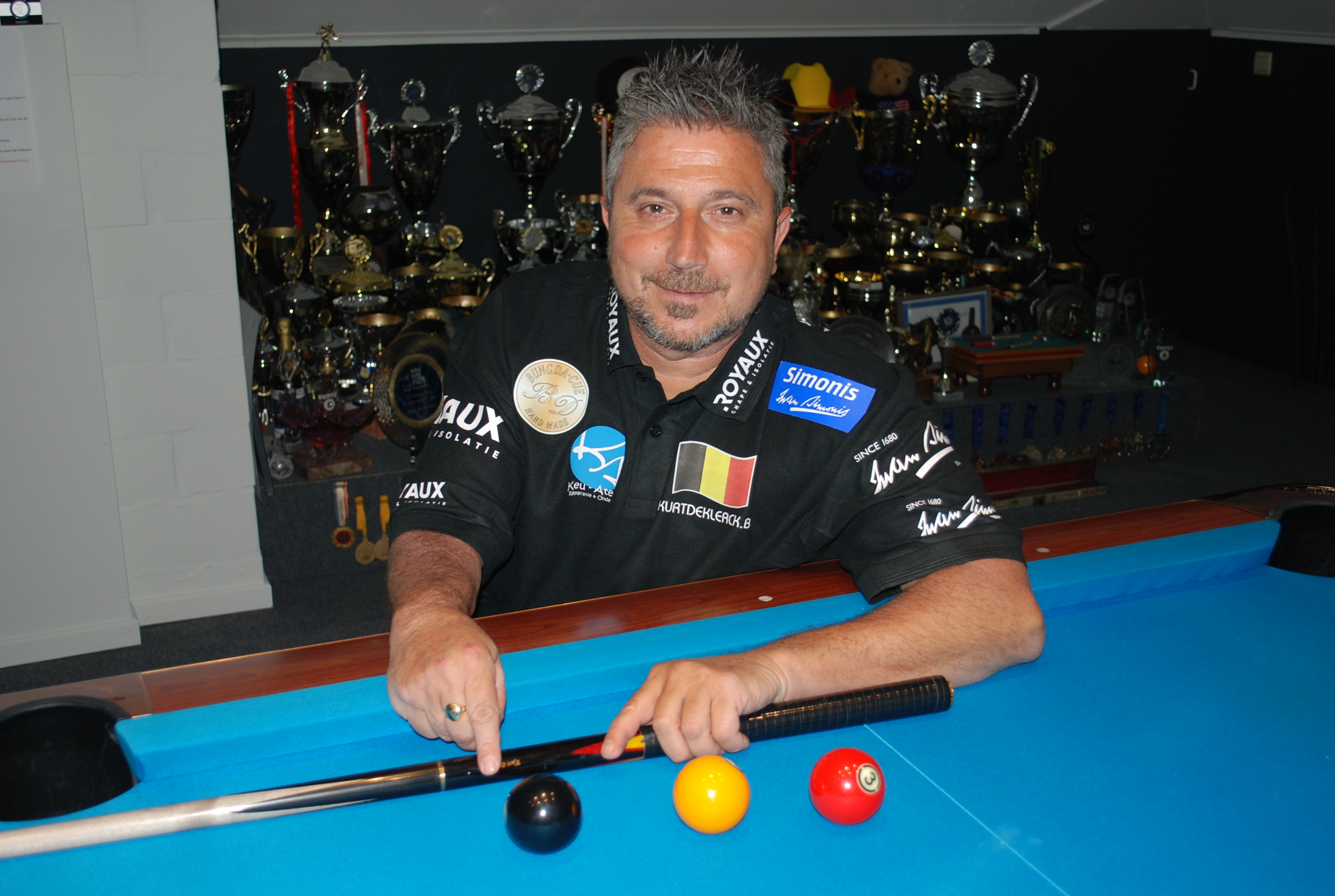 Klaar om naar EK te gaan